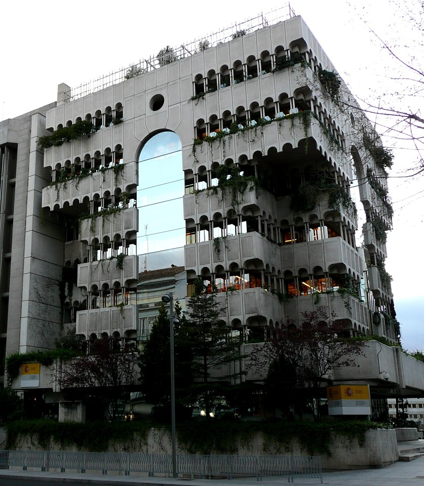 Calle de Serrano 67 y 69, sede del Banco Guipuzcoano y edificio gubernamental. Madrid, España.